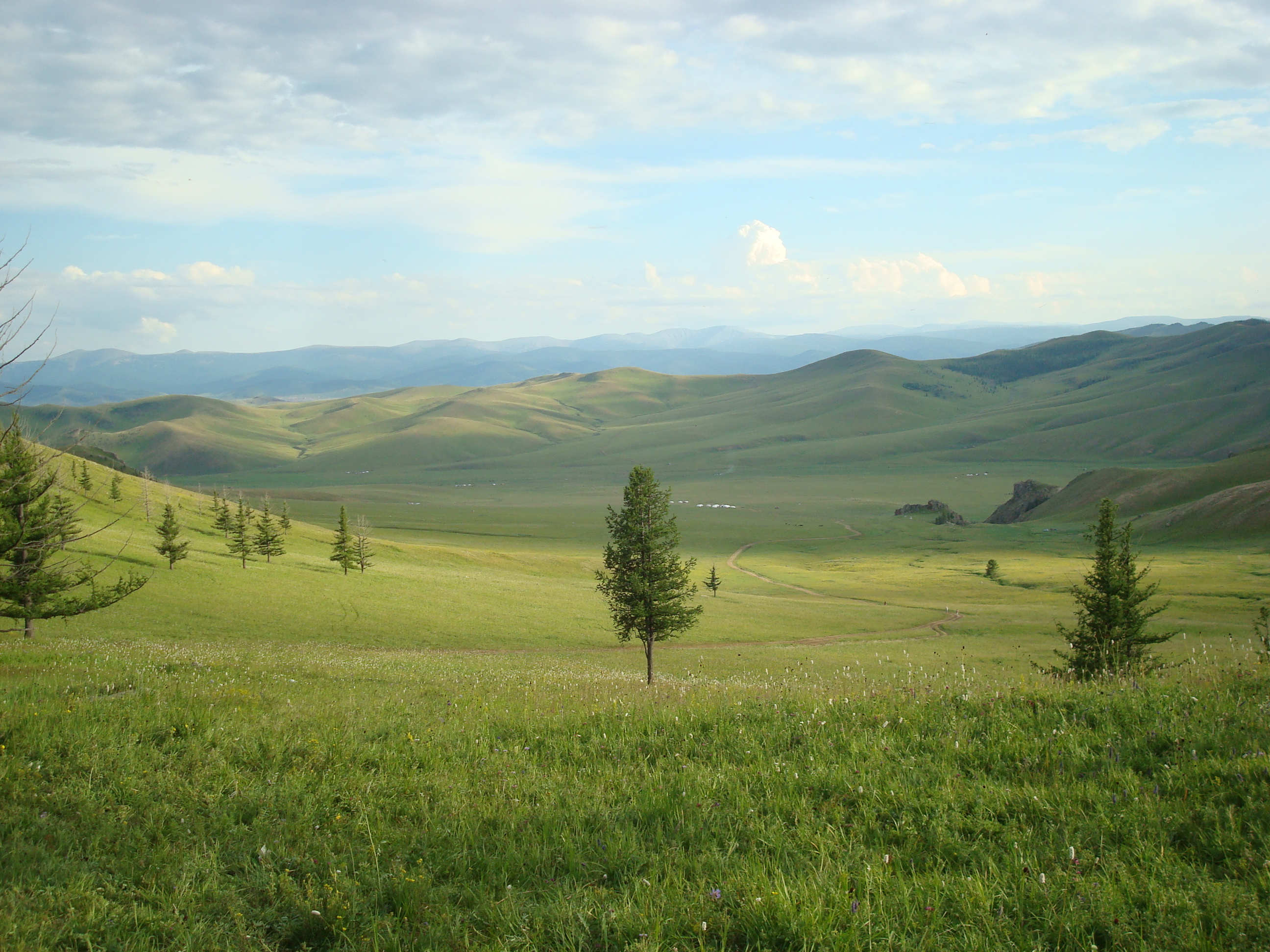 Im Orkhon River Valley National Park